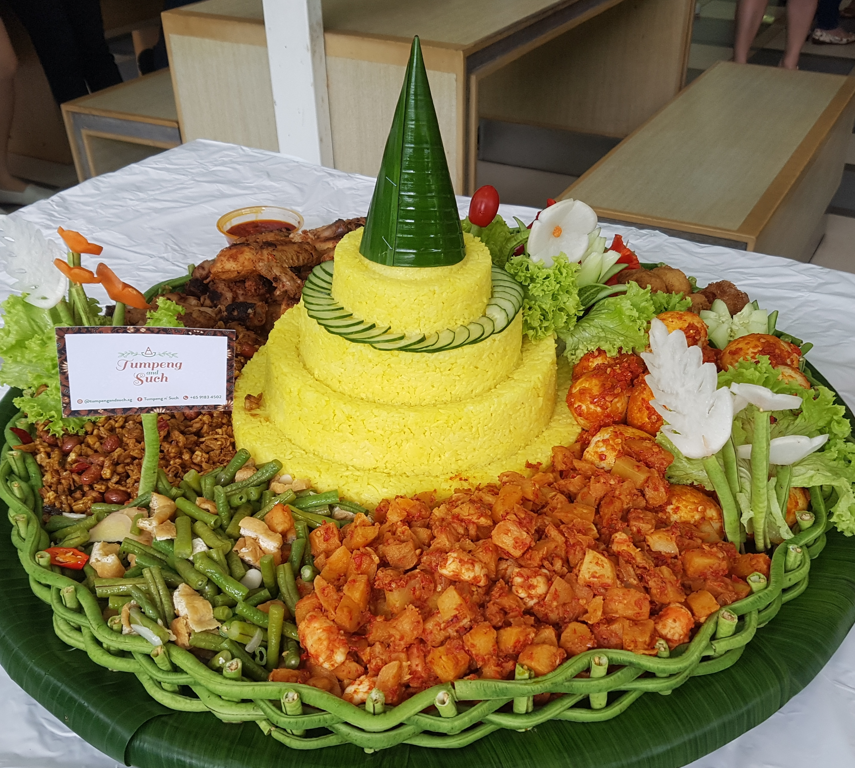 Indonesian party dish